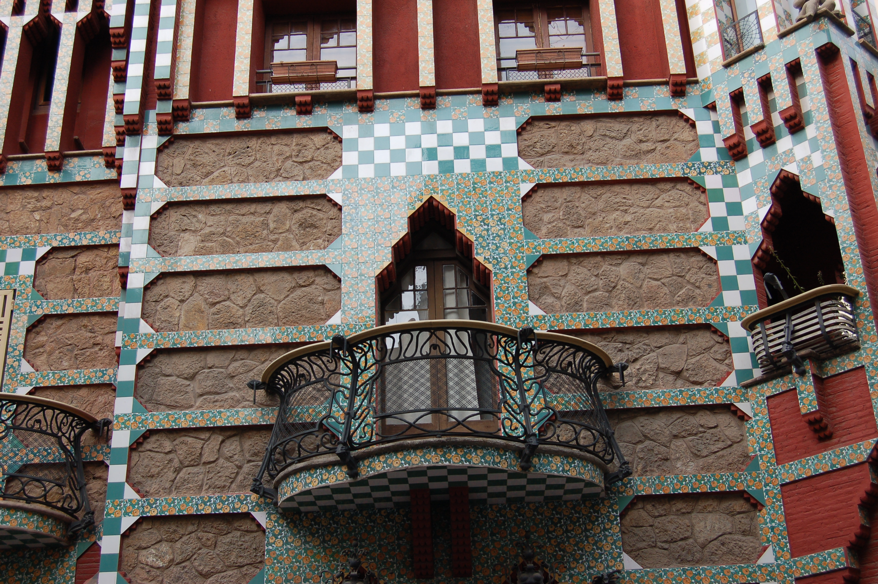 Barcelona, casa Vicens (Antoni Gaudí), detalle de balcón